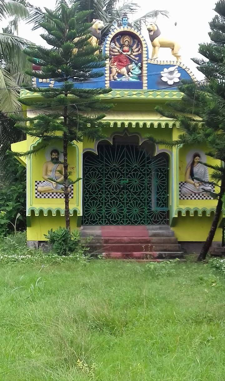 হরিণা শীতলা মন্দির